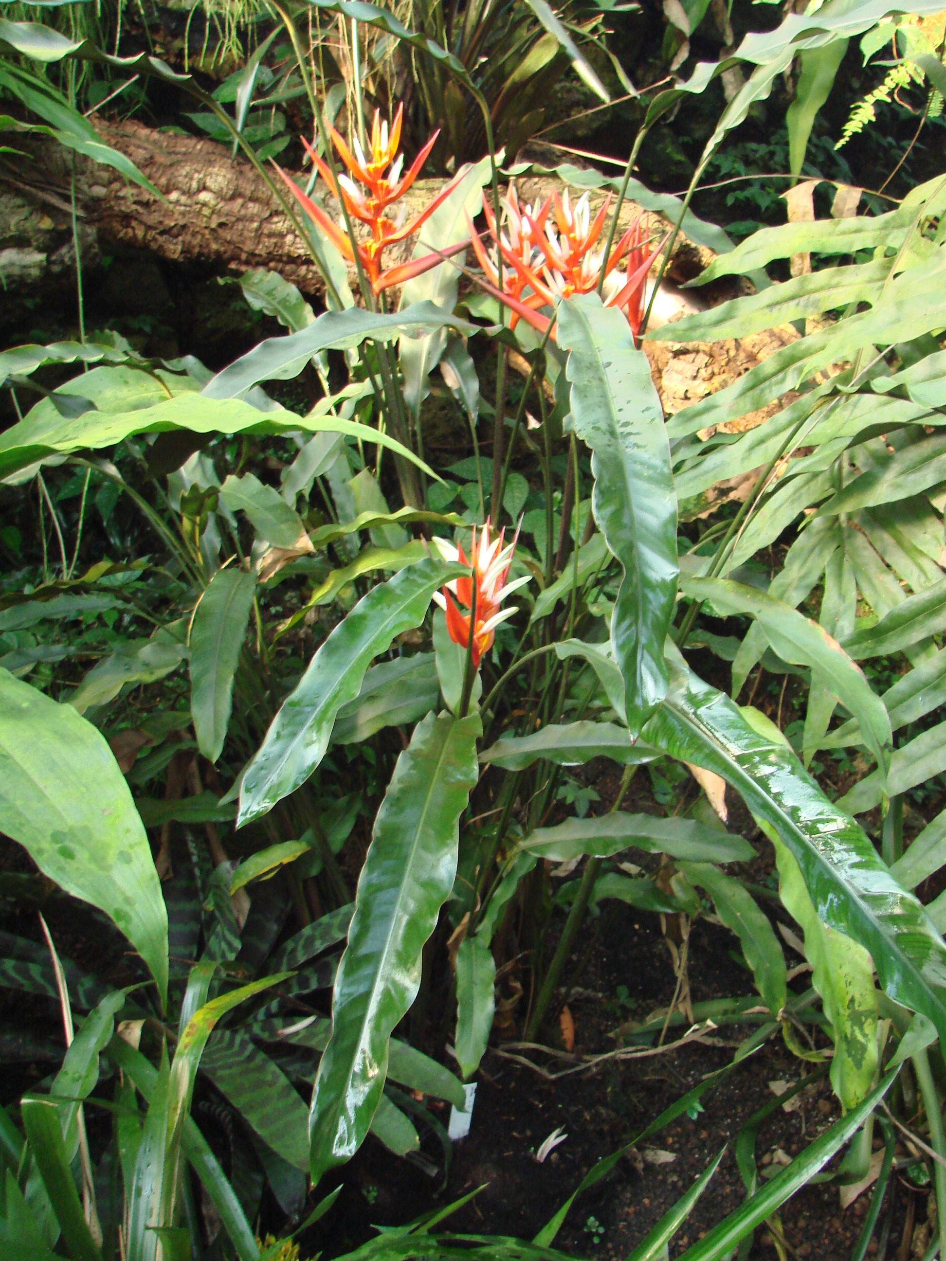 Jardin botanique de l'Université de Zurich (Suisse) : Heliconia angusta